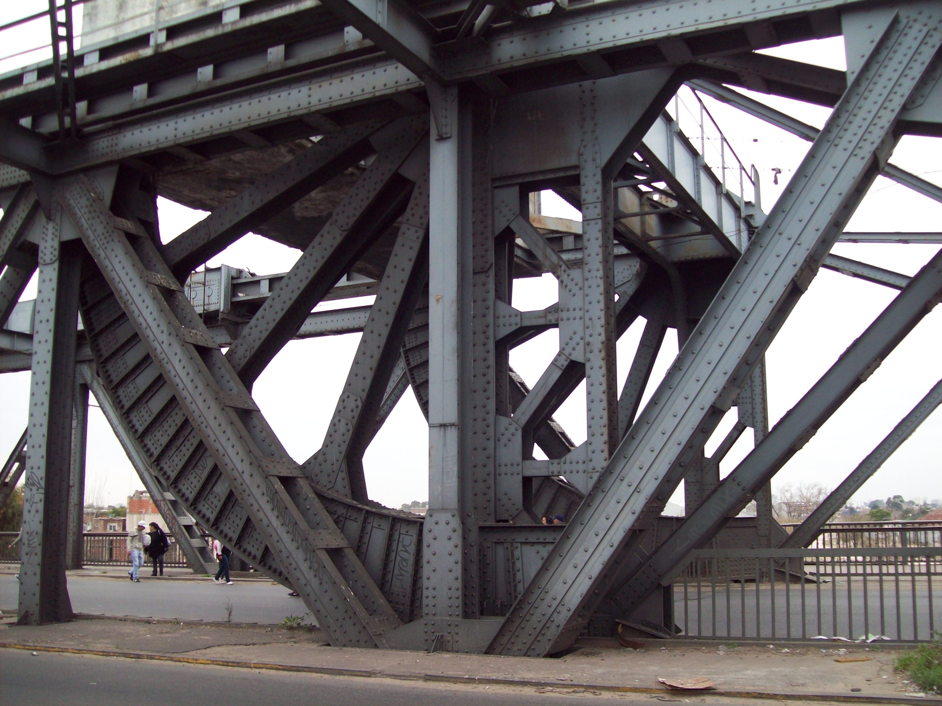 Estructura metálica Puente Alsina.